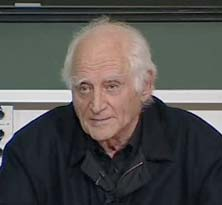 Michel Serres lors d'une conférence à l'Ecole Polytechnique le 1er décembre 2005.